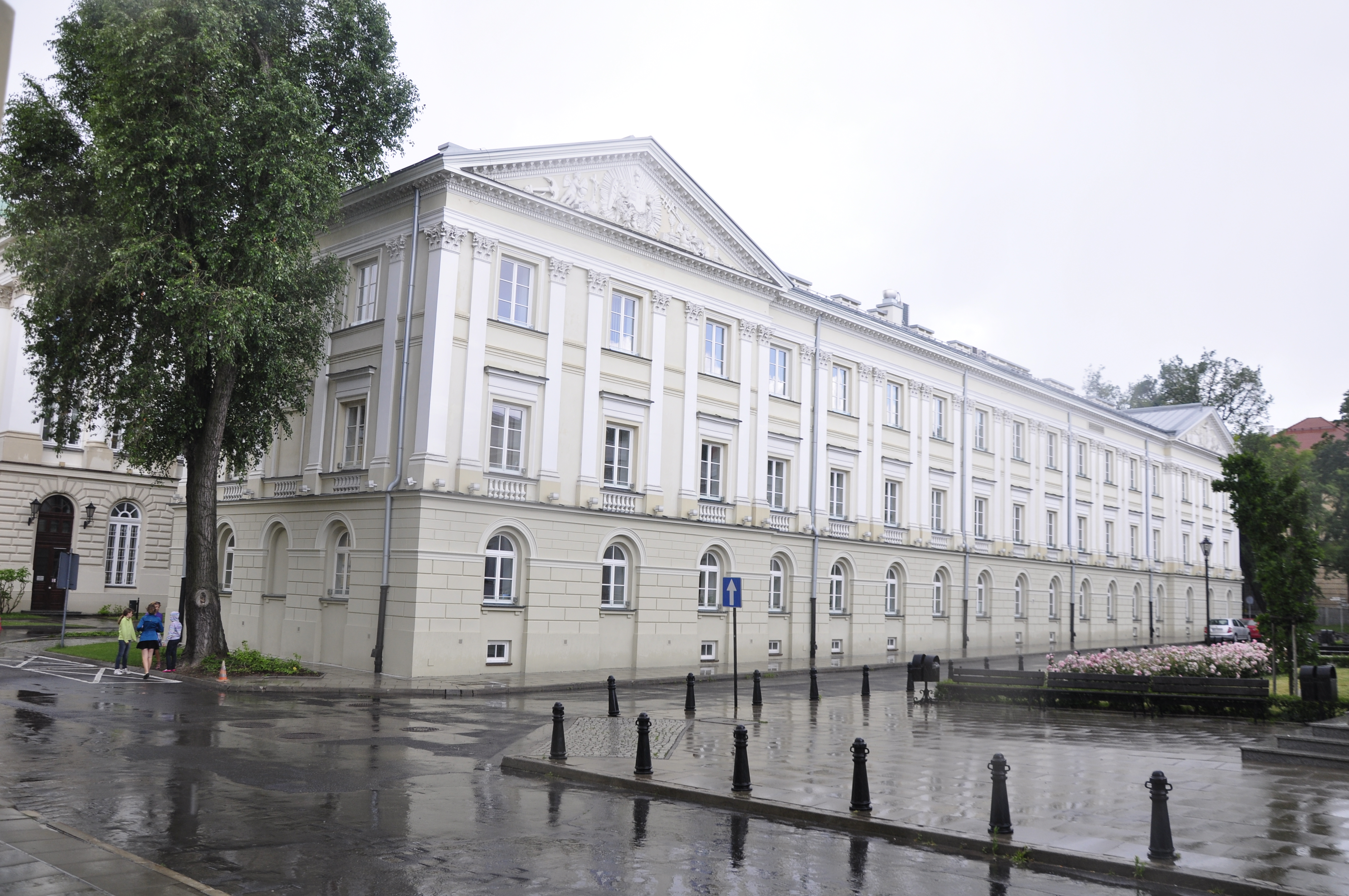 Warschau, Campus der Universität Warschau